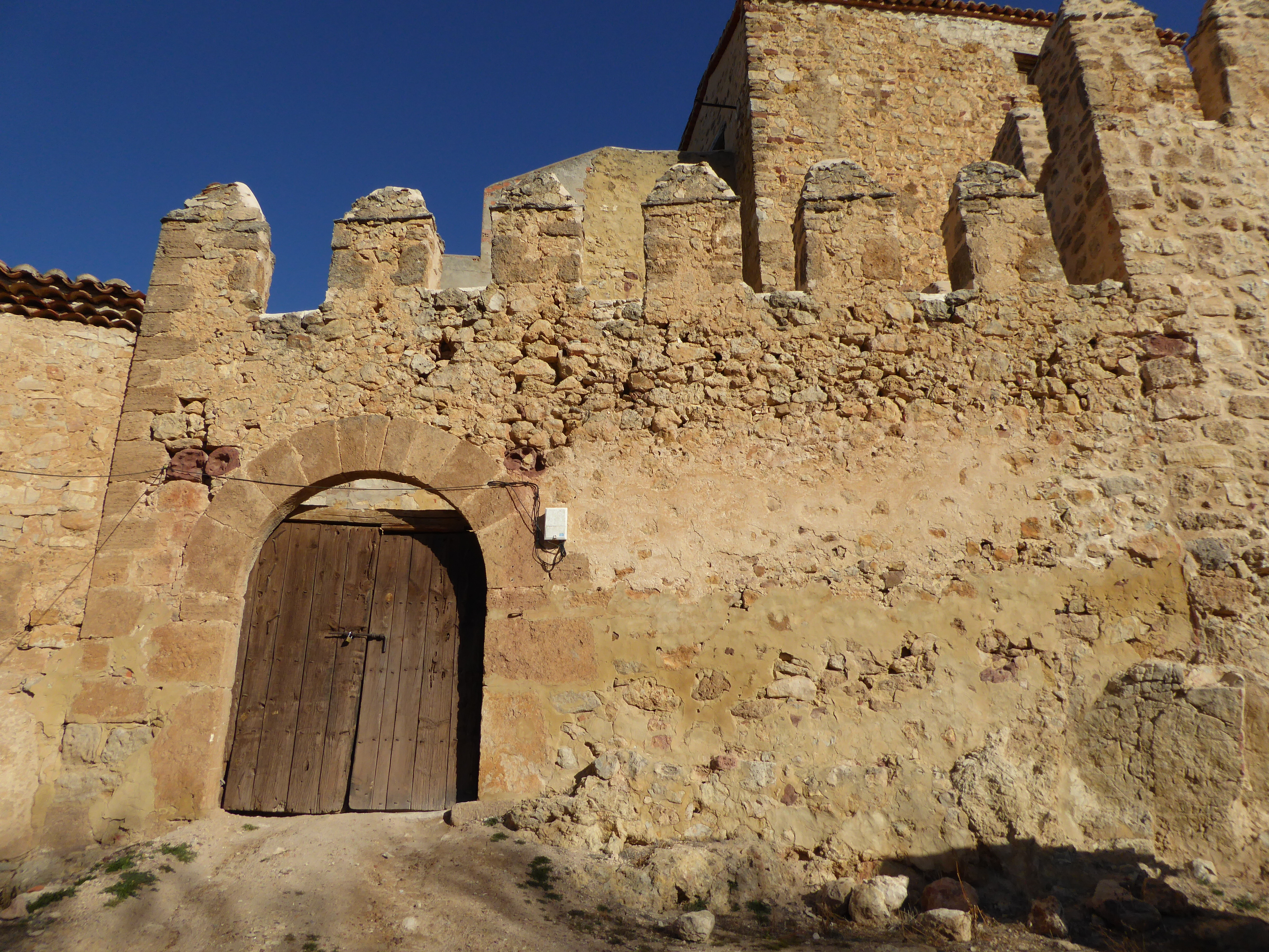 Castilnuevo